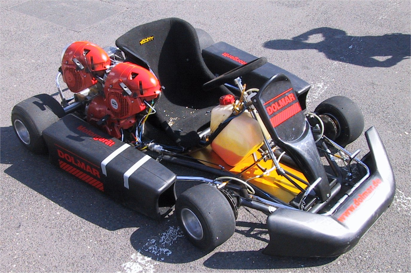 Dolmar Versuchs-Kart